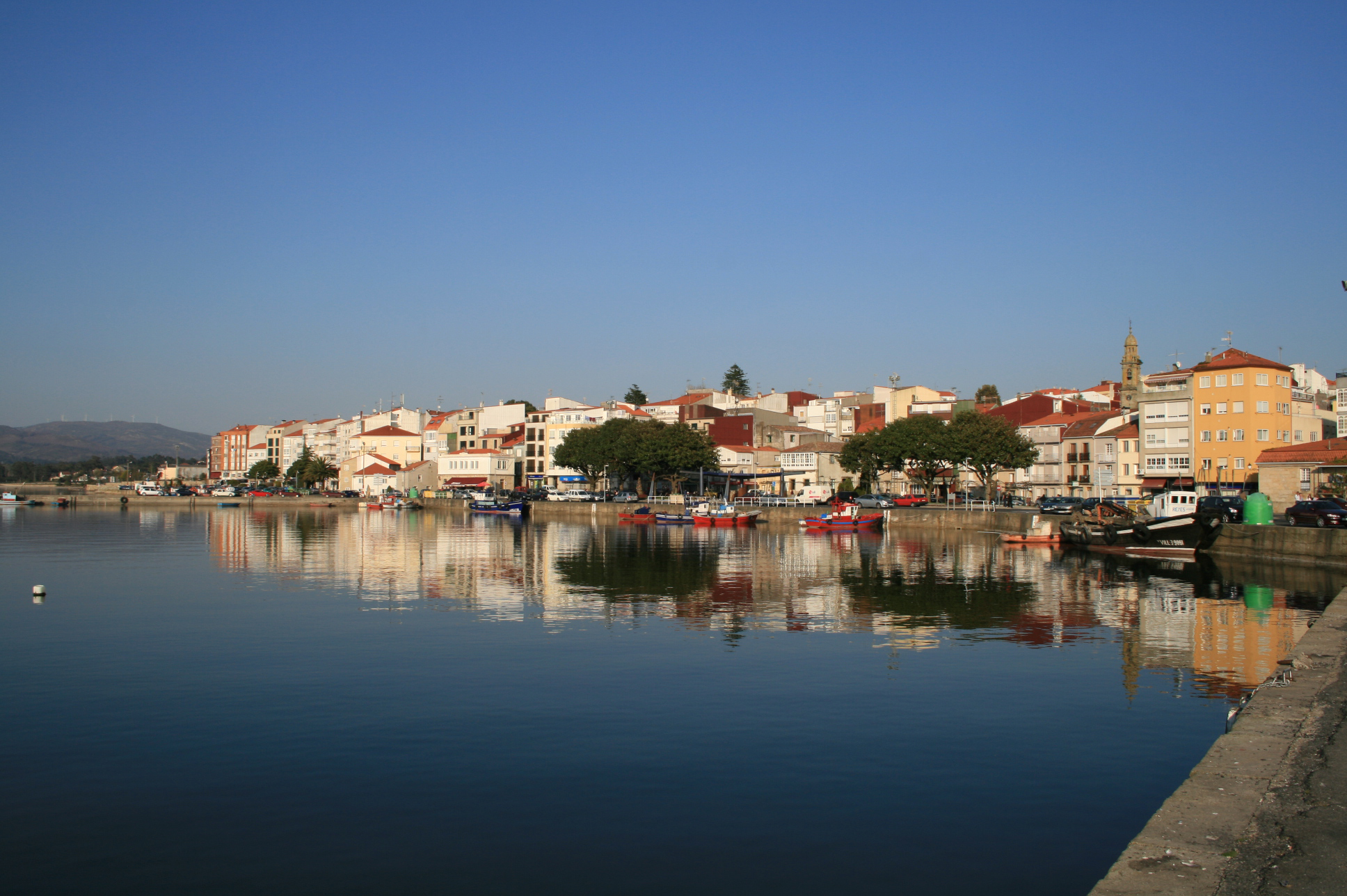 Vista de Rianxo, localidade que está situada na ría de Arousa.